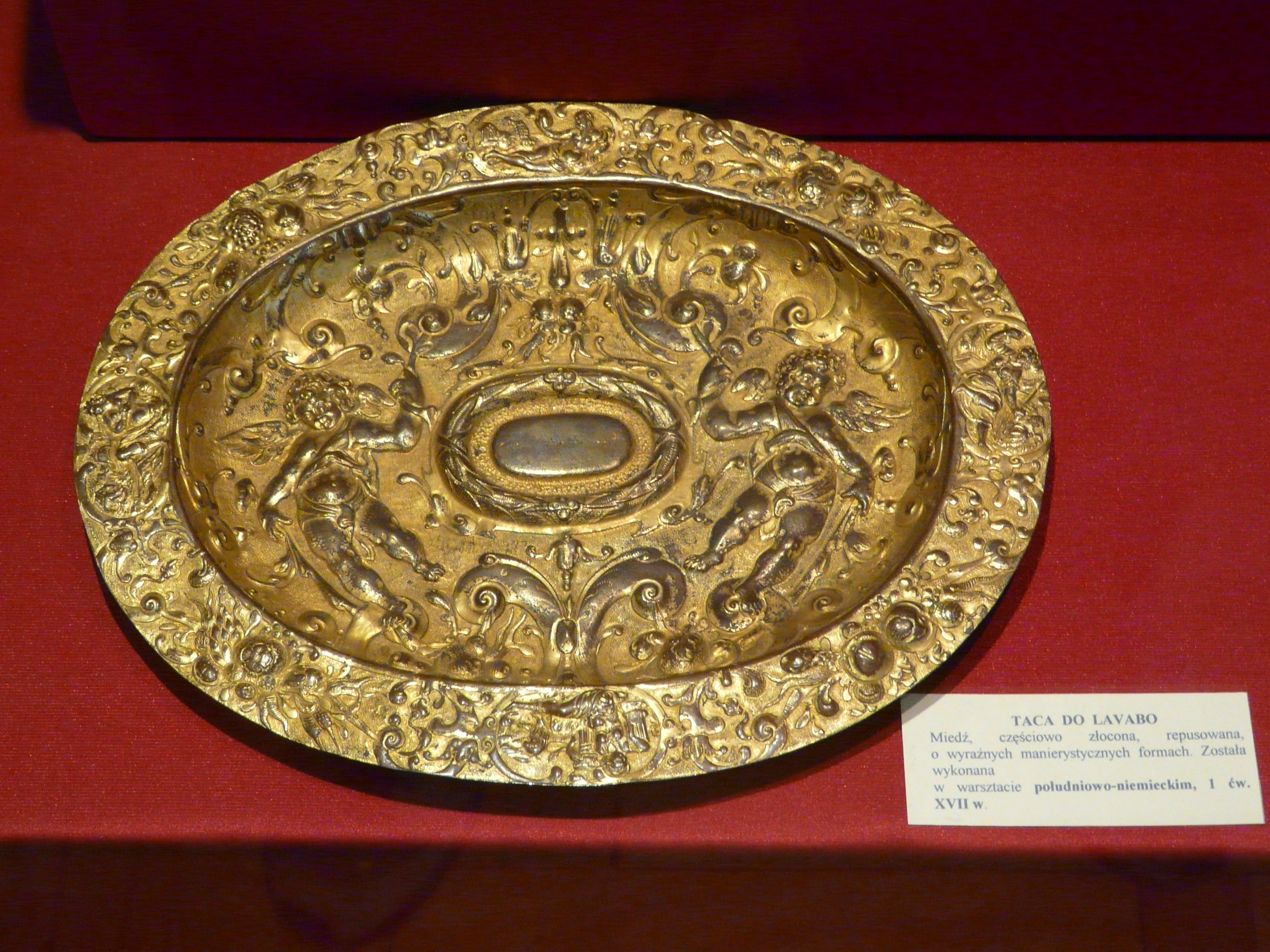 Museum of Archdiocese in Gniezno Taca do lavabo. Miedź, częsciowo złocona, repusowa, o wyraźnie manierystycznych formach. Została wykonana w warsztacie południwo-niemieckim, pierwsza cwierc XVII w.